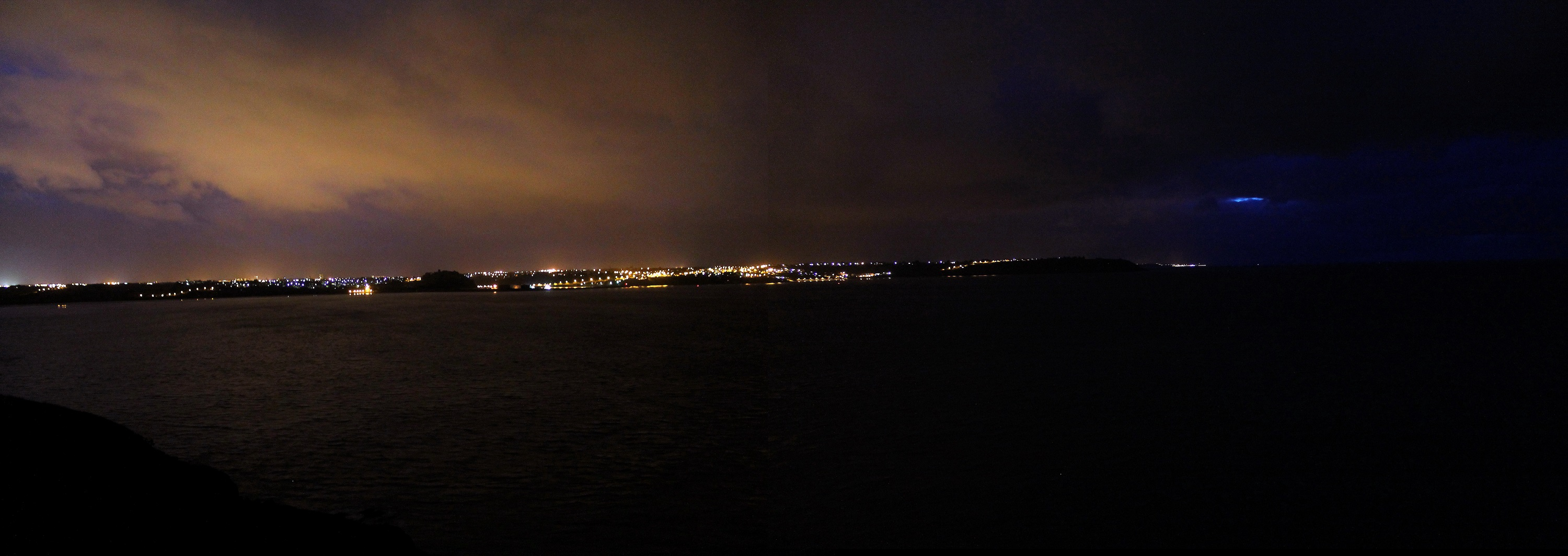 Panorama de la ville de St-Brieuc de nuit prise d'Hillion. On peux aussi voir les lumière de la ville de Saint-Quais Portrieux sur le droite